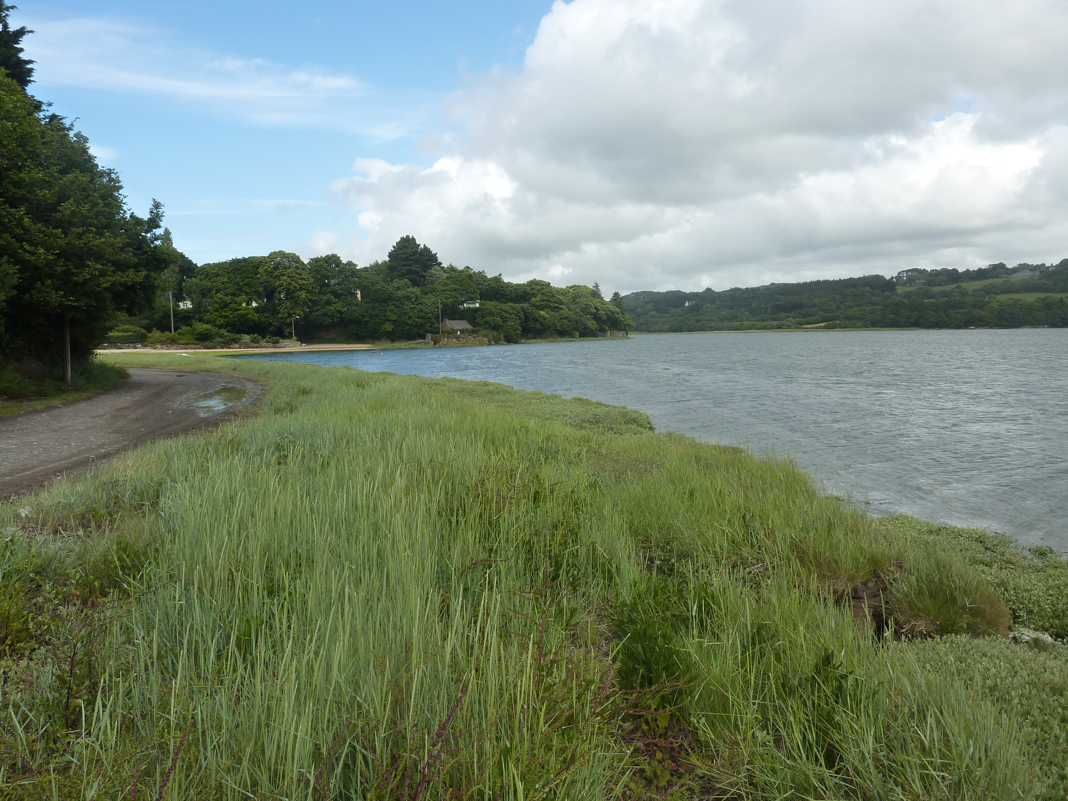 La Forest-Landerneau : l'anse du château en bordure de l'Elorn (vue vers l'amont)